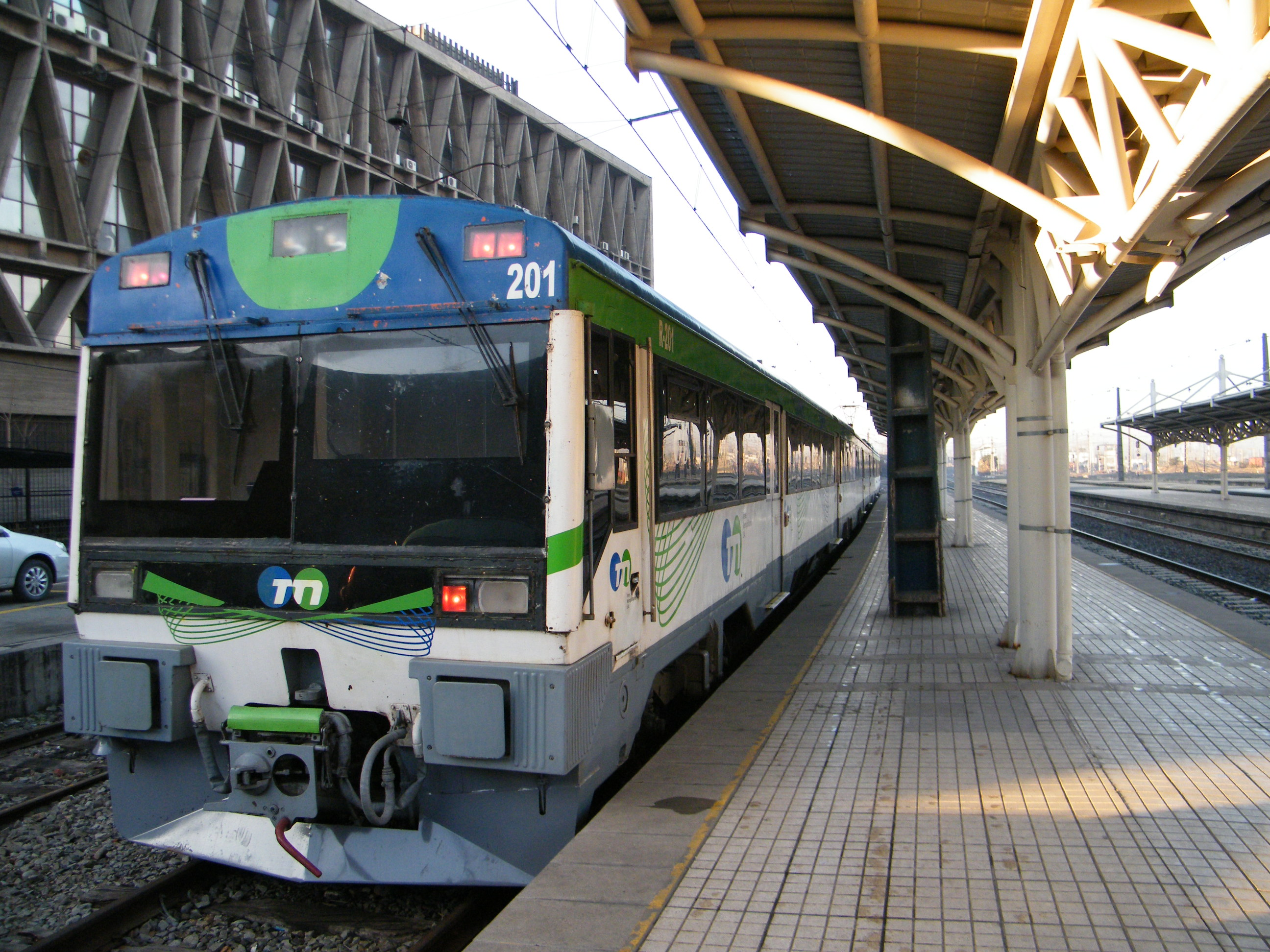 Estación Central de Ferrocarriles o Estación Alameda, »Metrotrén«-automotor eléctrico serie 440 de Renfe, modernizado en España entre 1994 y 1999 para el uso de cercanías.